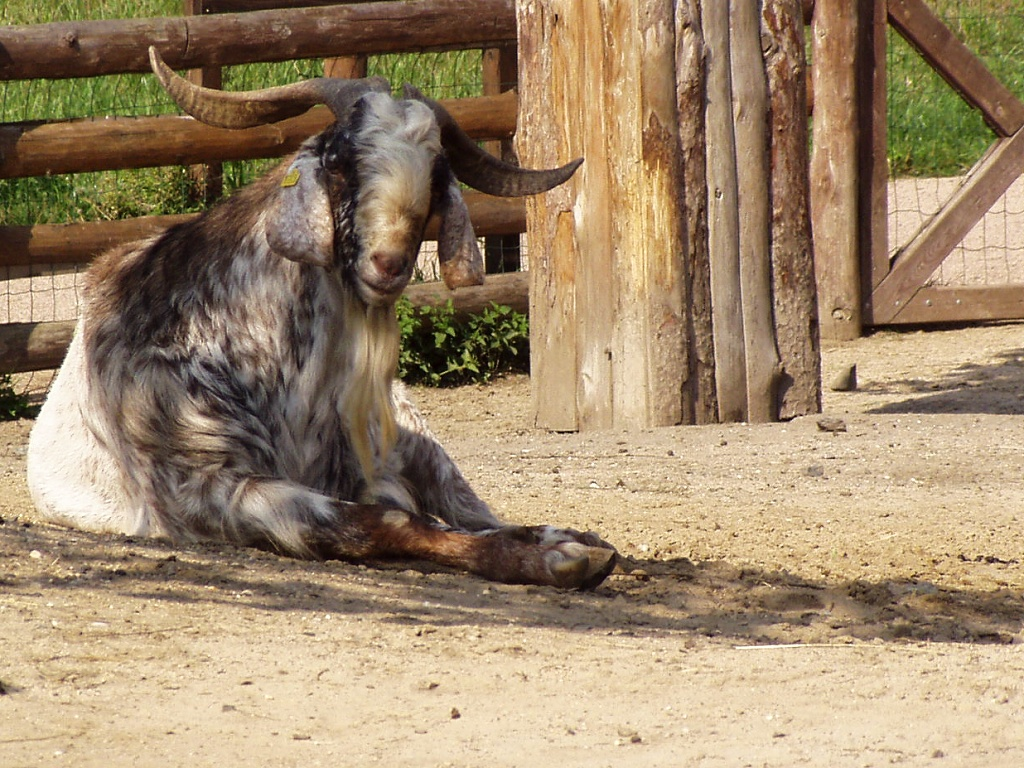 Nubian goat (Prague Zoo)